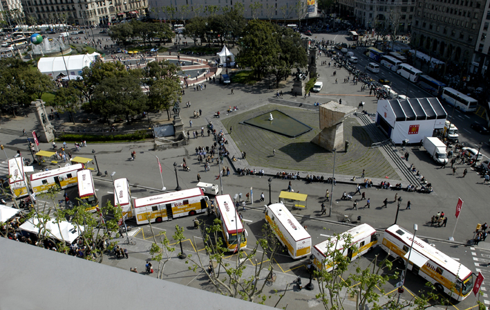 Trobada a la plaça Catalunya durant la festivitat de Sant Jordi de l'any 2003 amb els 9 bibliobusos de la Xarxa de Biblioteques Municipals de la Diputació de Barcelona